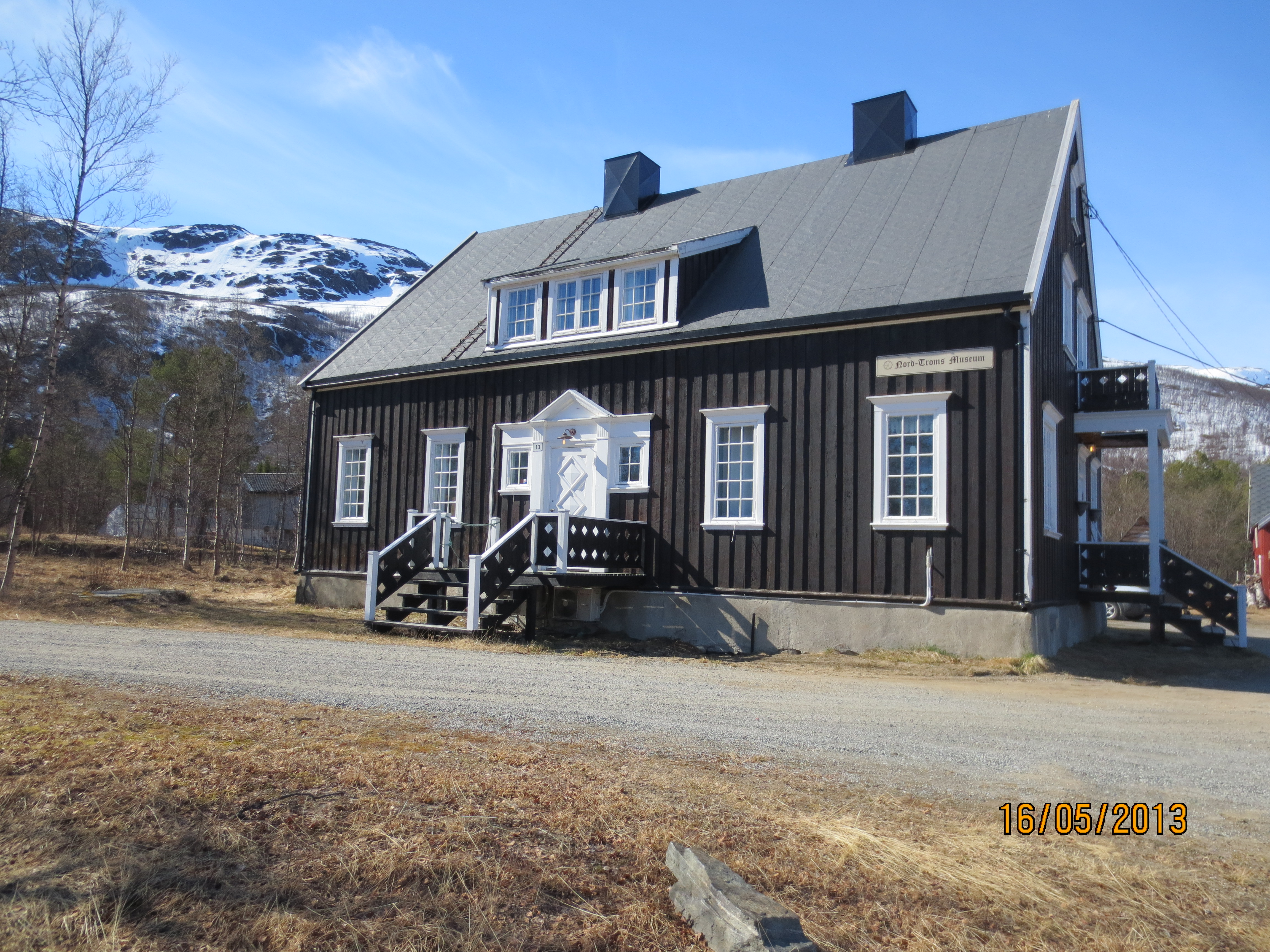 Administrasjonsbygg for Nord-Troms museum